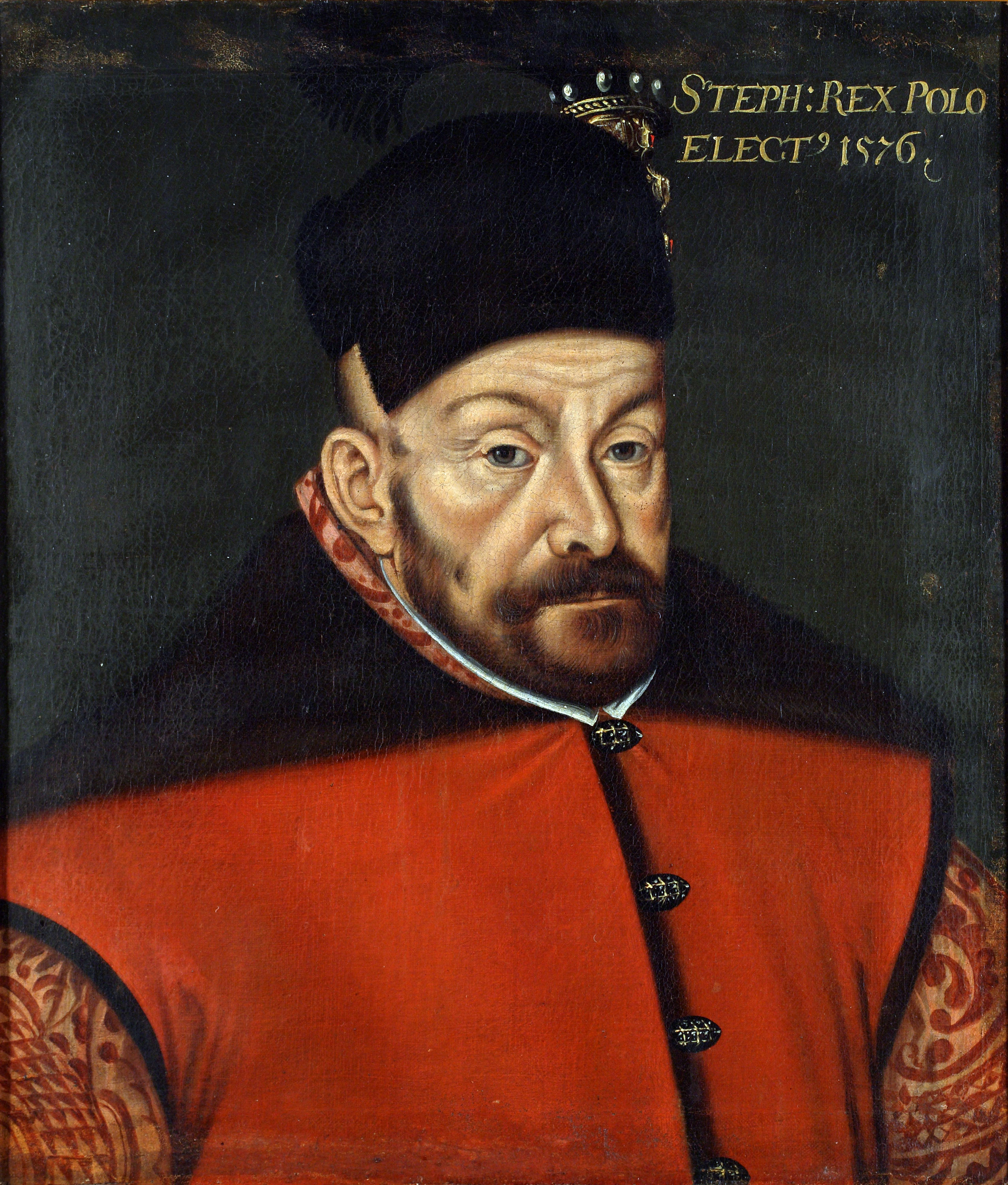 Беларуская (тарашкевіца): Партрэт караля і вялікага князя Стэфана Баторыя (Stefan Batory)